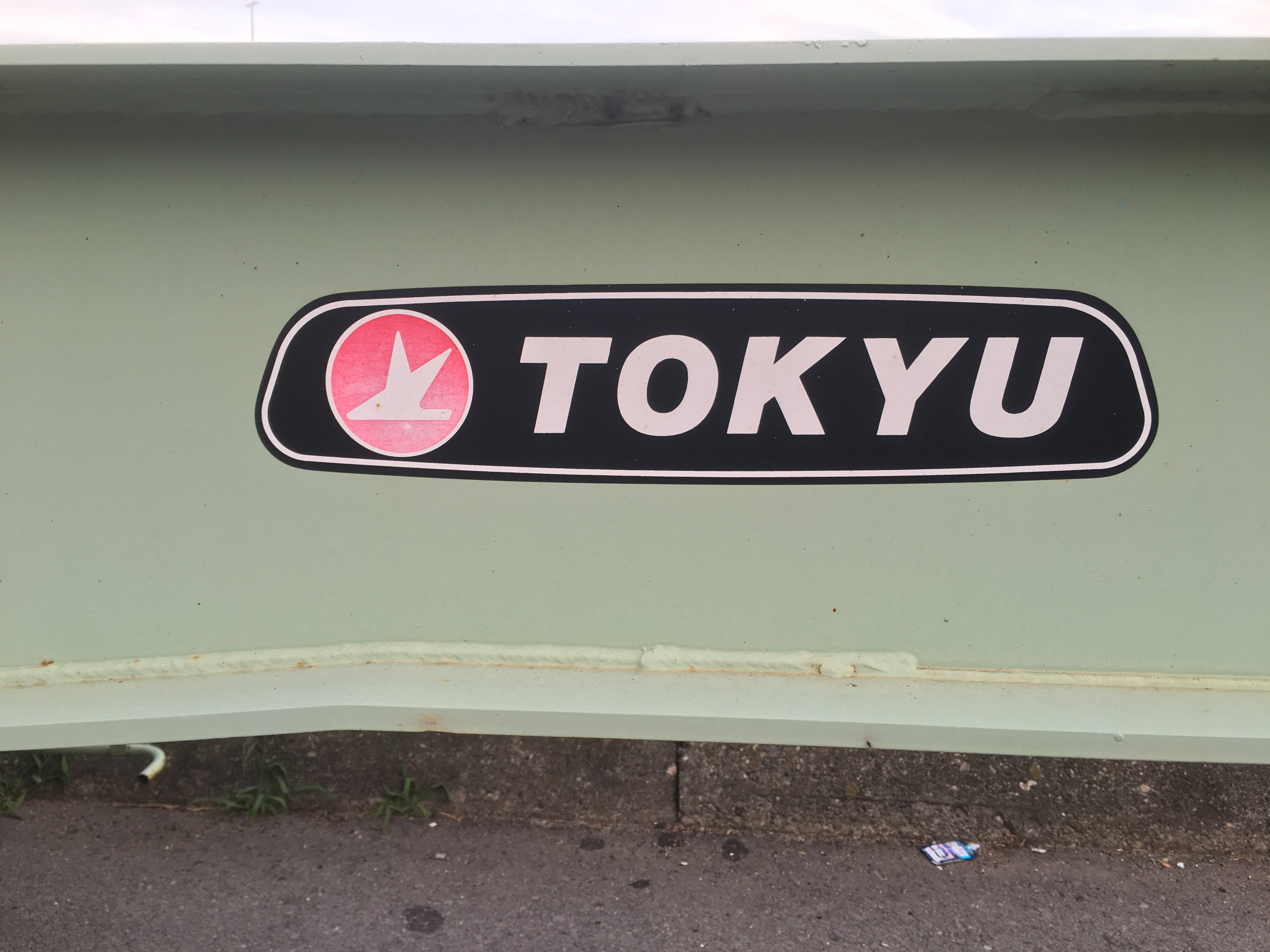 被けん引車（トレーラー）に貼付された東急車輛製造の特装車専用ロゴ入りステッカー